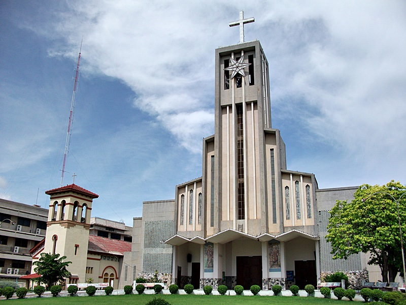 โบสถ์นักบุญโยแซฟ